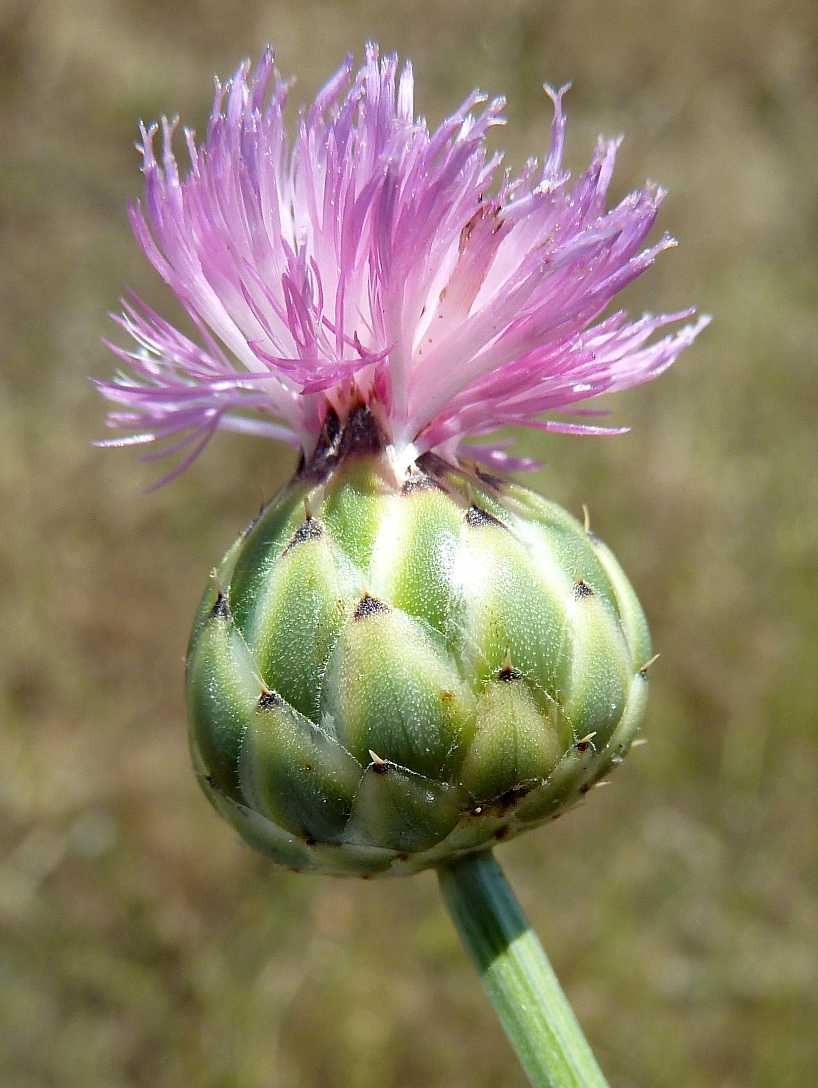 Mantisalca salmantica ( Cabezuela, escobones, pan de pastor, ...) - Capítulo en antesis. - Circa estación FFCC Embajadores-Abroñigal, Madrid, España.